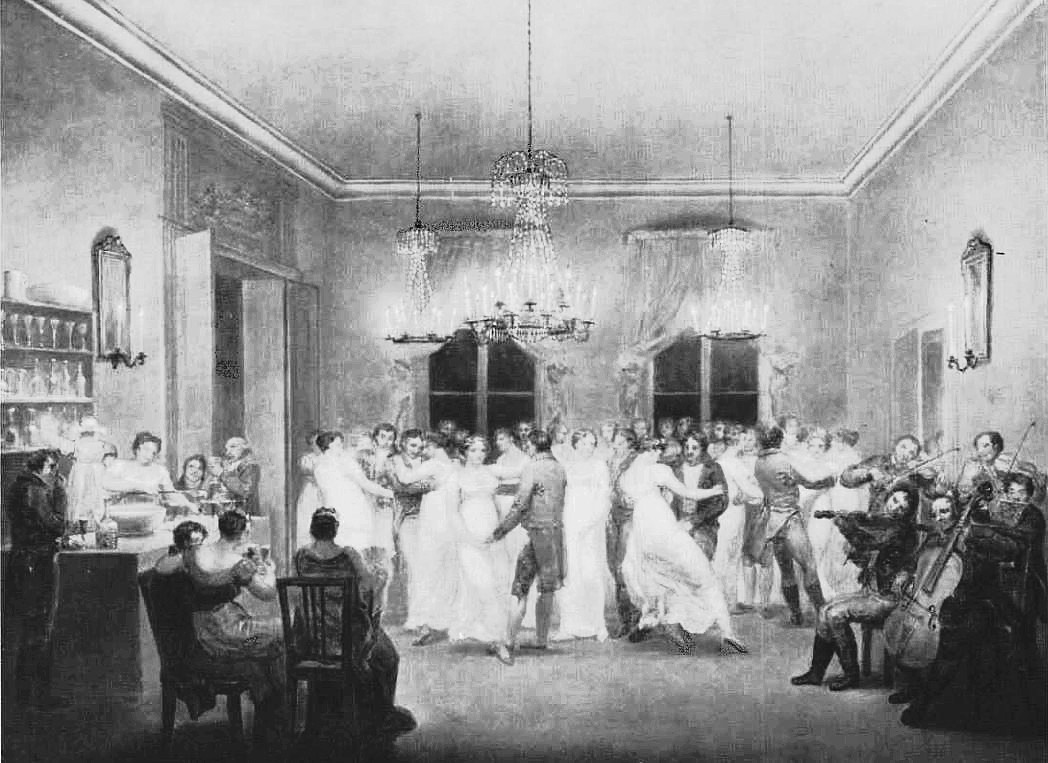 Clas på hörnet, balsal 1814